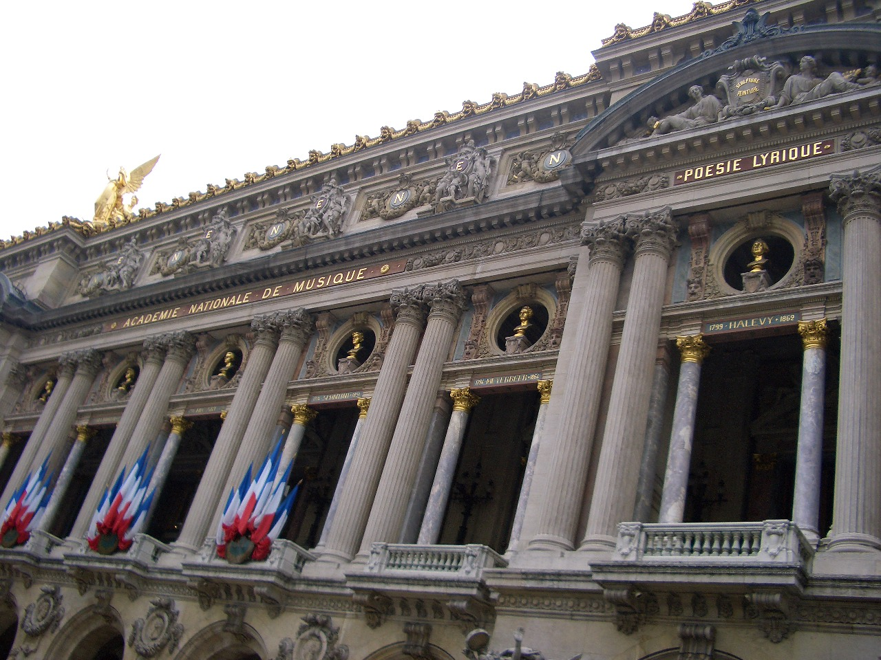 Foto de la Academie Nationale de Musique en París, Francia, tomada el viernes 30 de septiembre de 2005